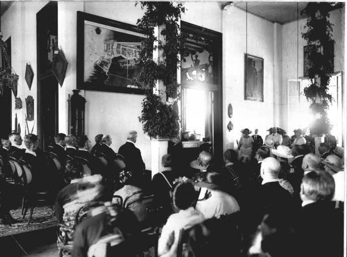 Foto. Aangeboden aan Zijne Excellentie den Gouverneur-Generaal van Nederlandsch-Indië ter gelegenheid van de opening der Rechts Hoogeschool te Batavia. Opening van de Rechtshogeschool te Batavia tijdens de rede van prof.P.Scholten